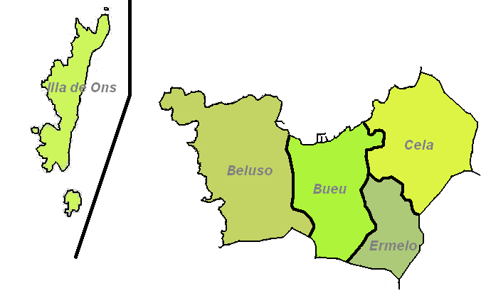 O concello de Bueu na actualidade